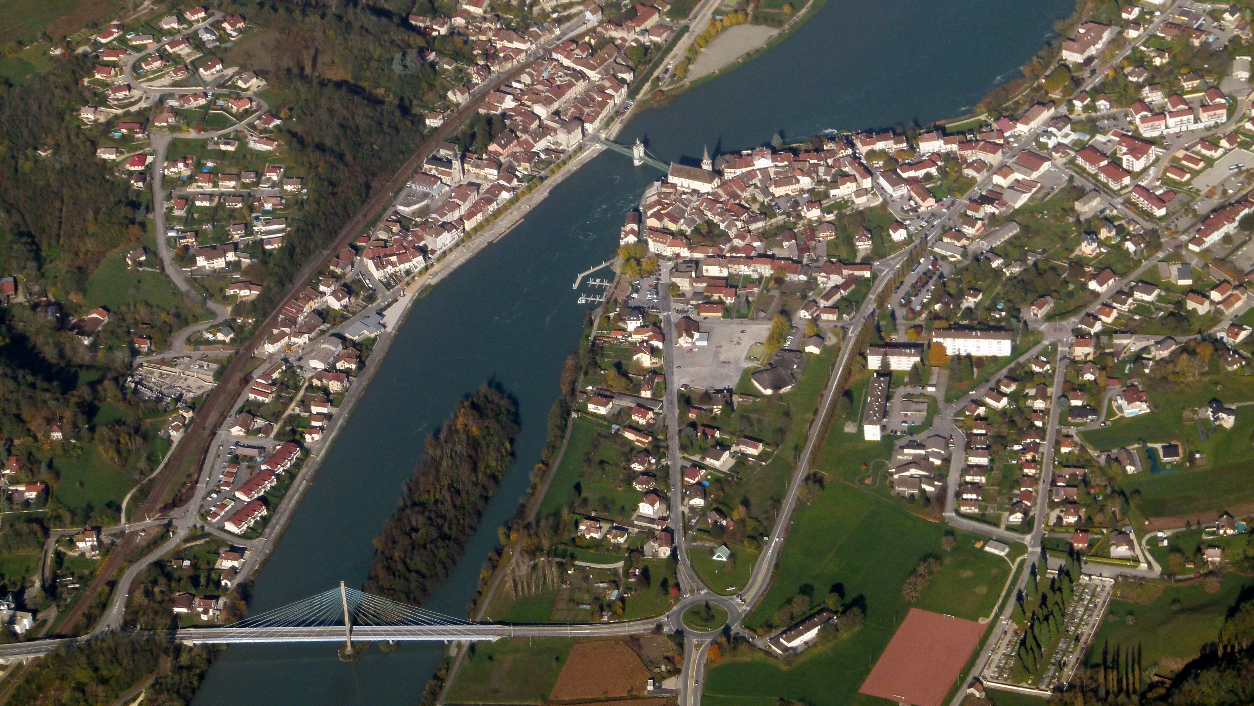 Seyssel (Haute-Savoie) vom Flugzeug aus